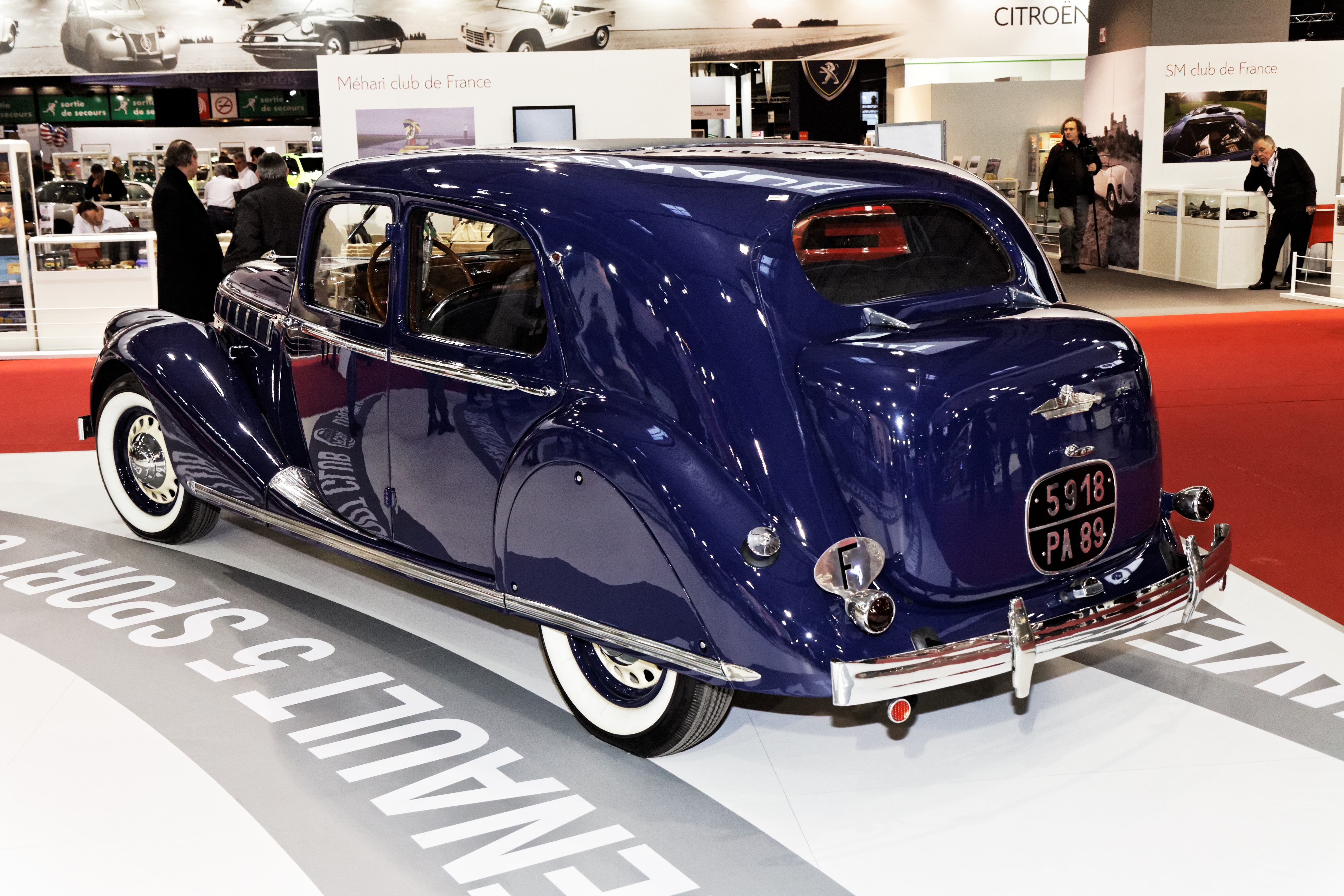 Une Renault Nerva grand sport présentée lors du salon Retromobile 2013.